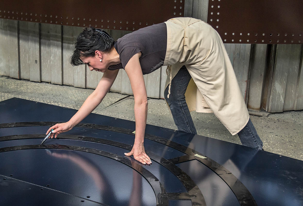 Irena Jůzová, Smalt Art Vítkovice 2013